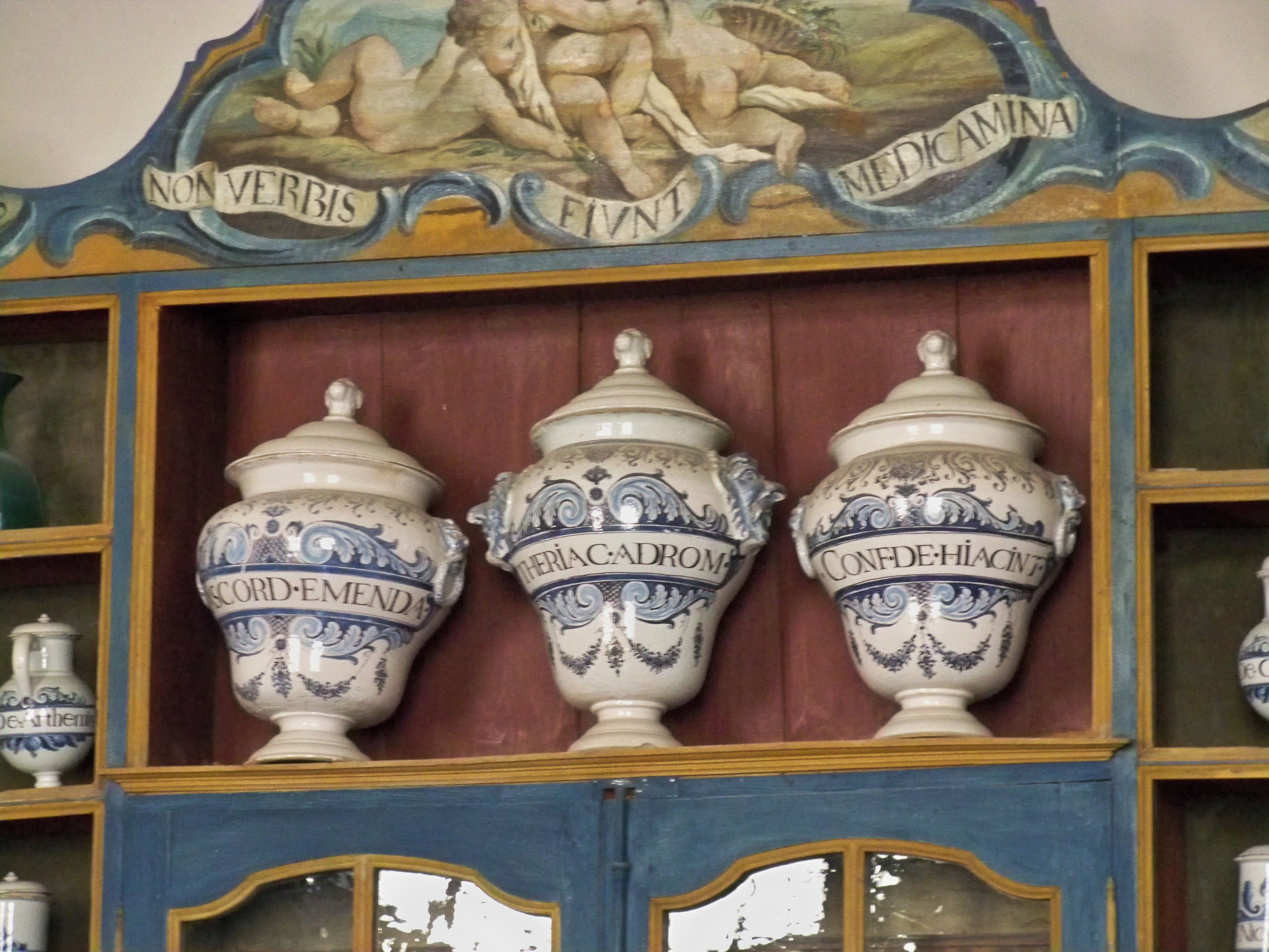 pot en faïence de Moustiers à l’Hôtel Dieu de Carpentras